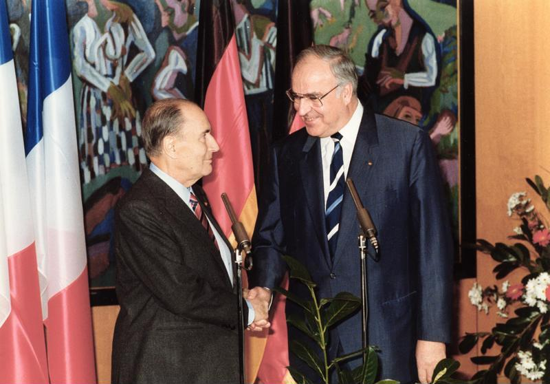 Staatsbesuch Frankreich Begrüßung Bundeskanzler Helmut Kohl